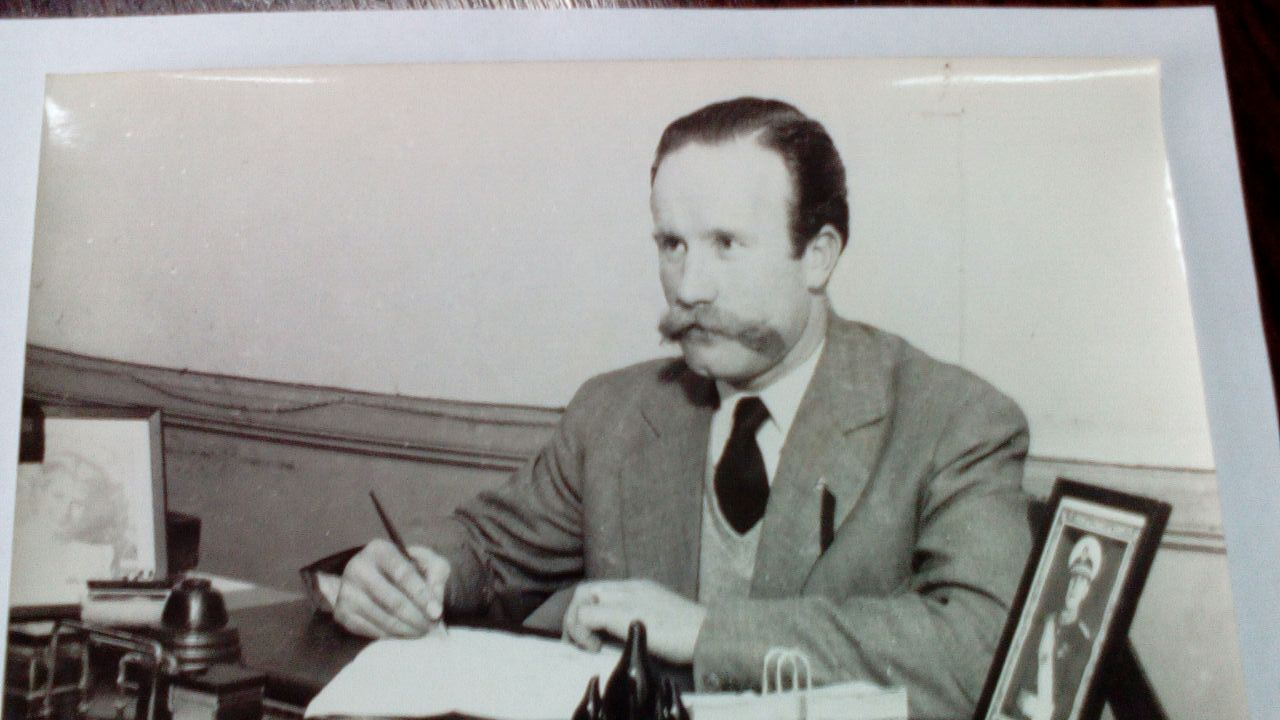 Geronimo Manuel Izetta